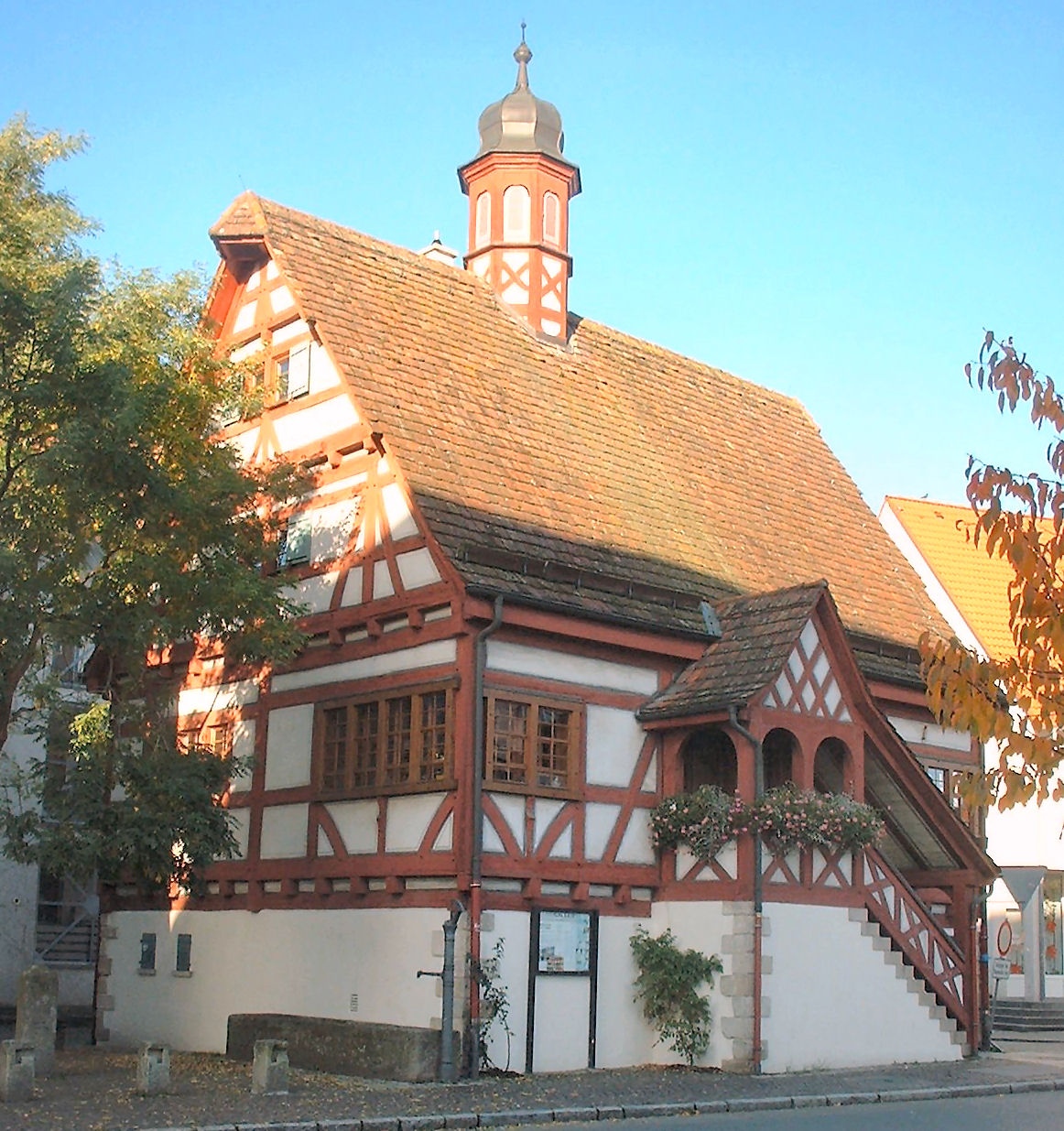 Altes Rathaus in Maichingen, sehr schön restauriertes Fachwerkhaus von 1540